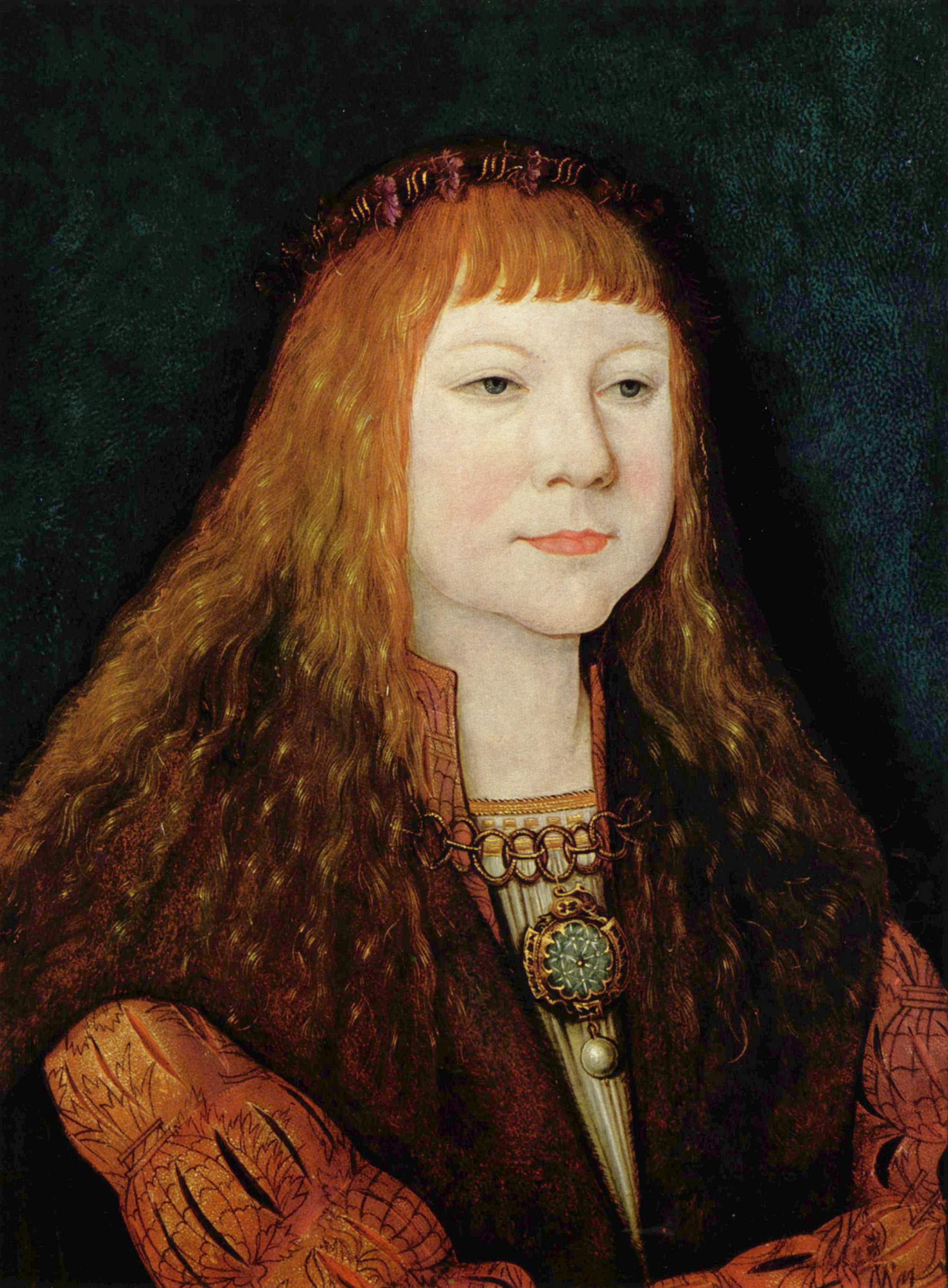 Porträt König Ludwig II. von Ungarn als KnabeLouis II of Hungary as a Childtitle QS:P1476,de:"Porträt König Ludwig II. von Ungarn als Knabe" label QS:Lde,"Porträt König Ludwig II. von Ungarn als Knabe" label QS:Len,"Louis II of Hungary as a Child"